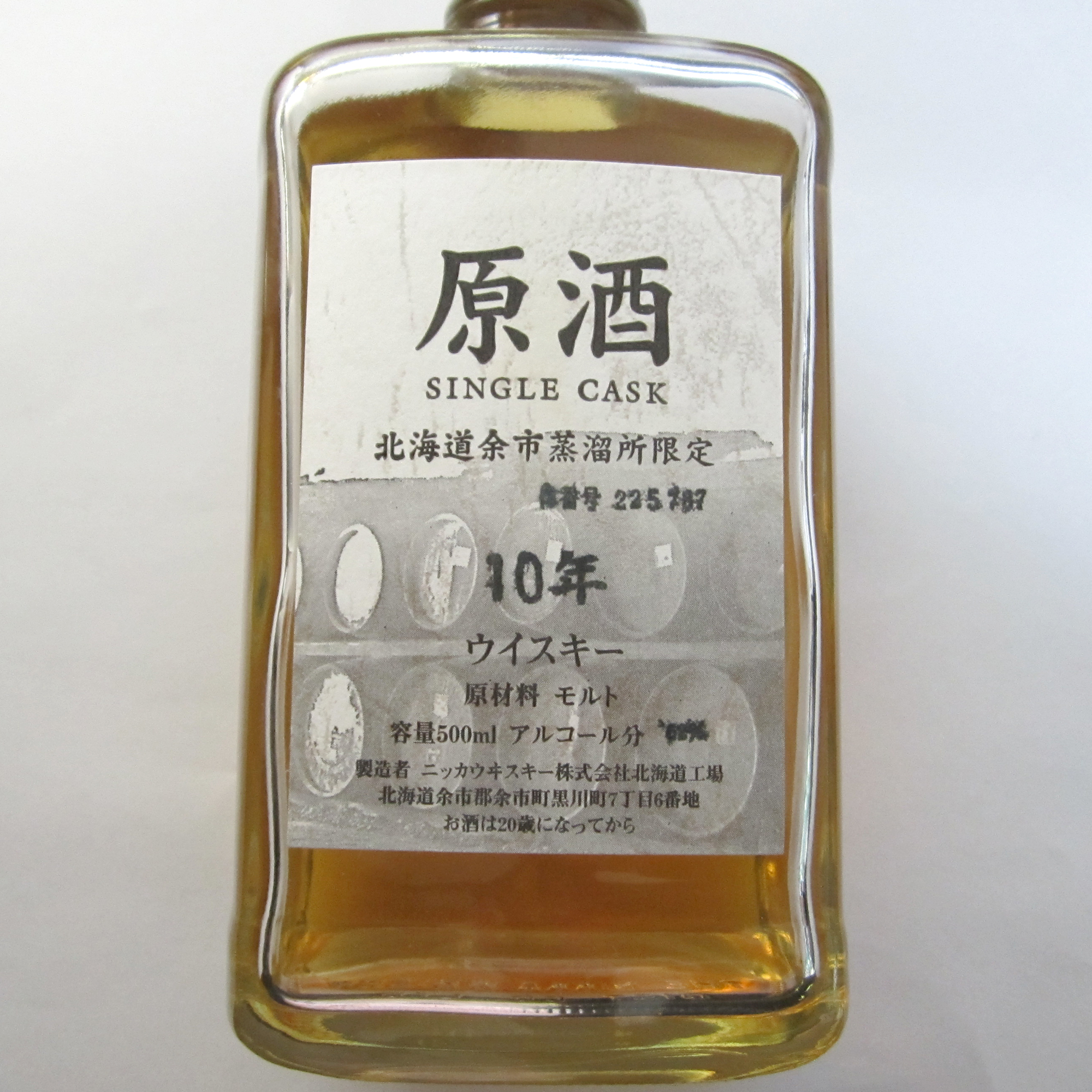 シングルカスク 余市10年（購入時5,000円）